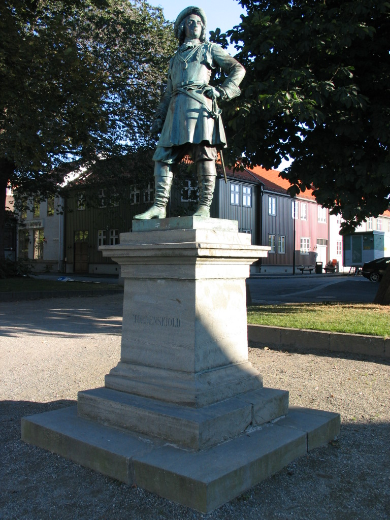 Monument in Trondheim